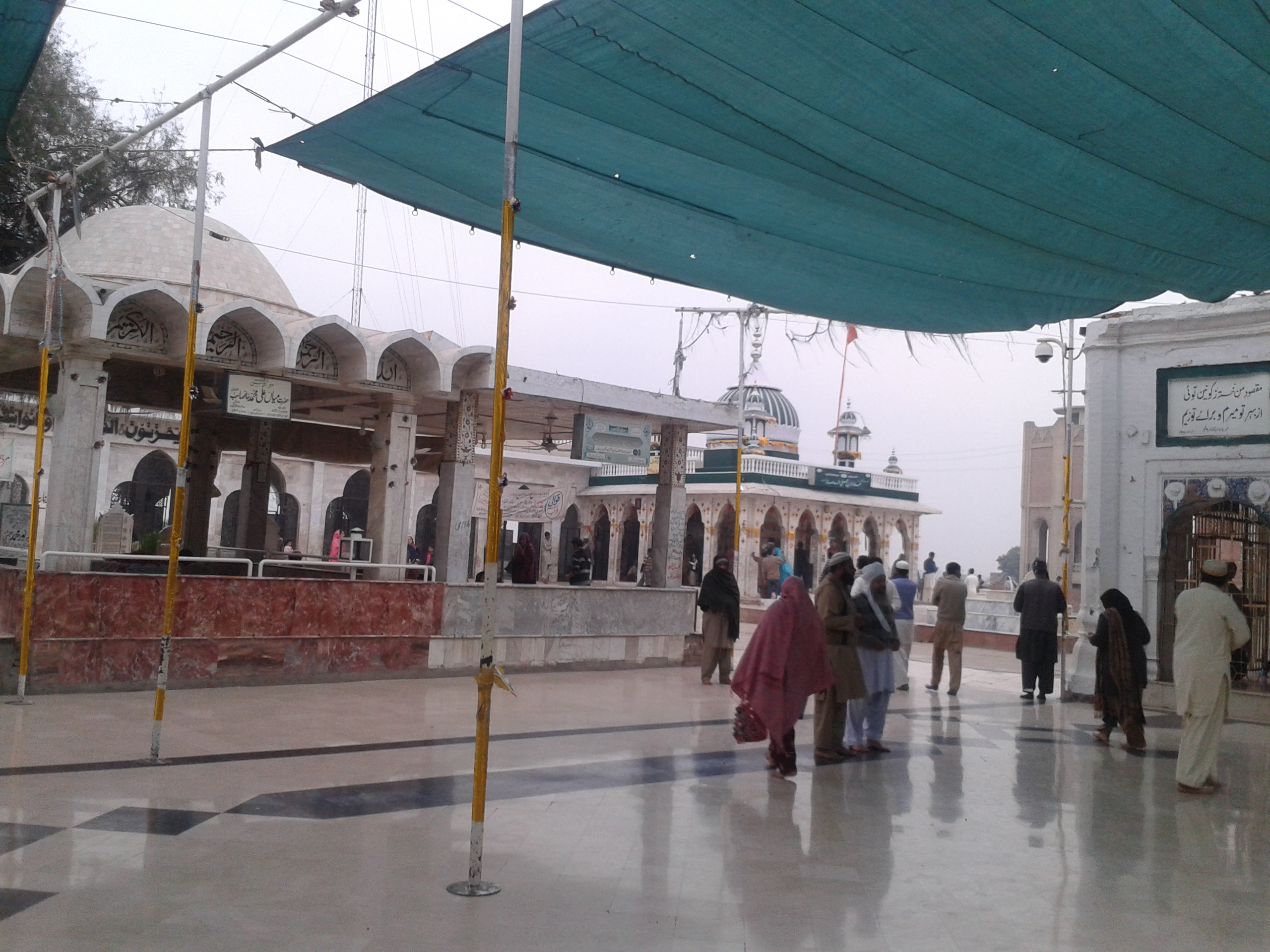 Darbar Hazrat Baba Farid ud Deen Ganj Shakar Rahmatullah Alaih